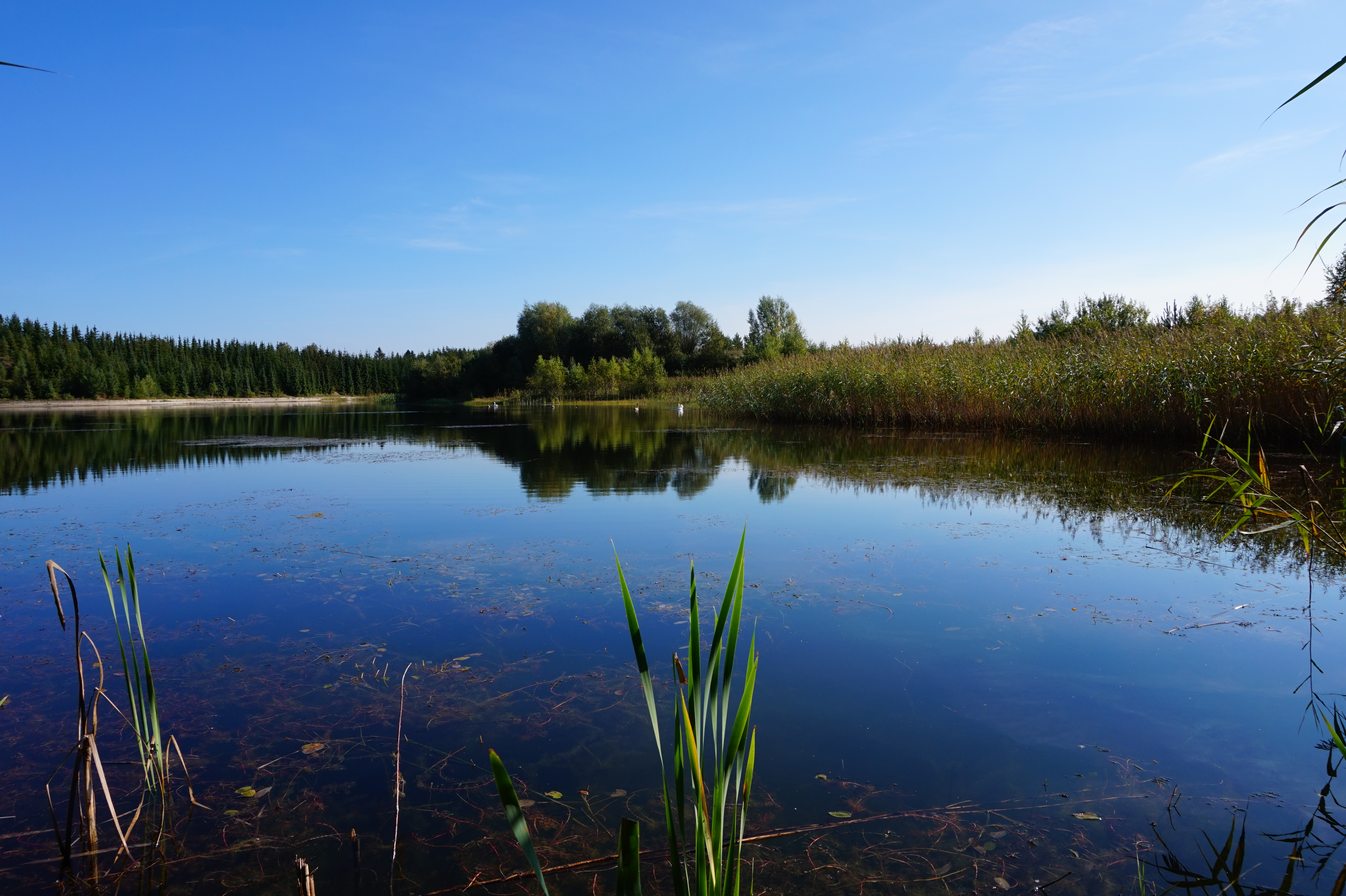 Jeziorko we wsi Postołowo